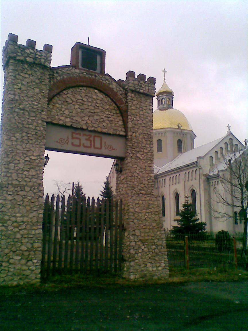 Брама: Брама